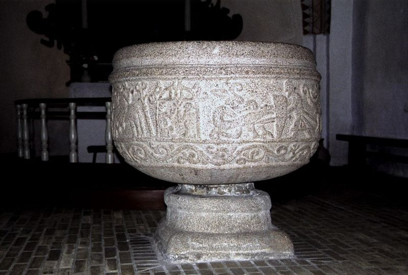 Lihme Kirke, (Skive Kommune), Døbefont